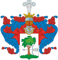 Герб рода Ушаковых